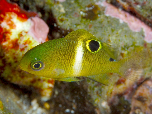 ハクセンスズメダイ Plectroglyphidodon leucozonus